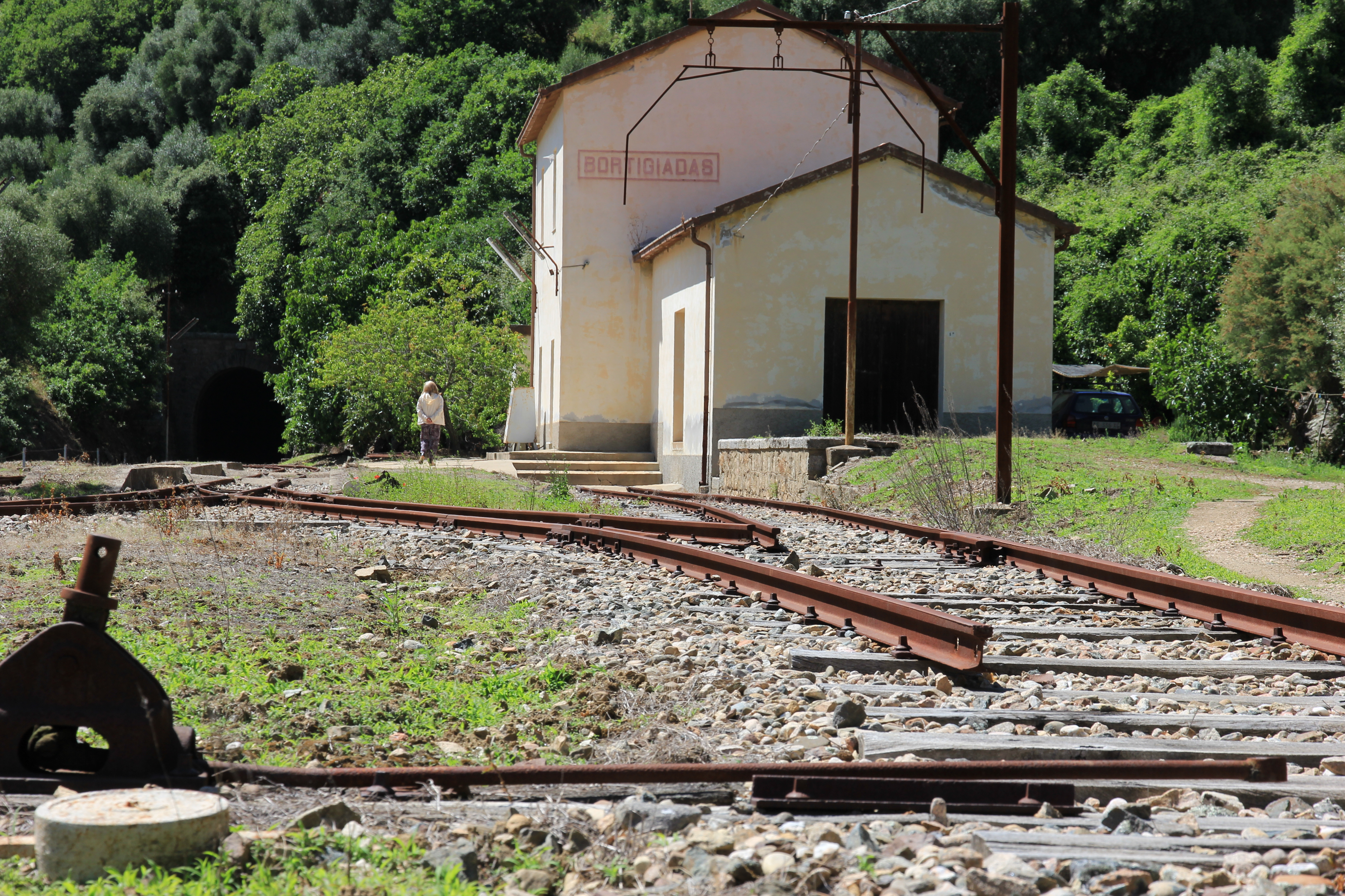 Bortigiadas - Stazione ferroviaria